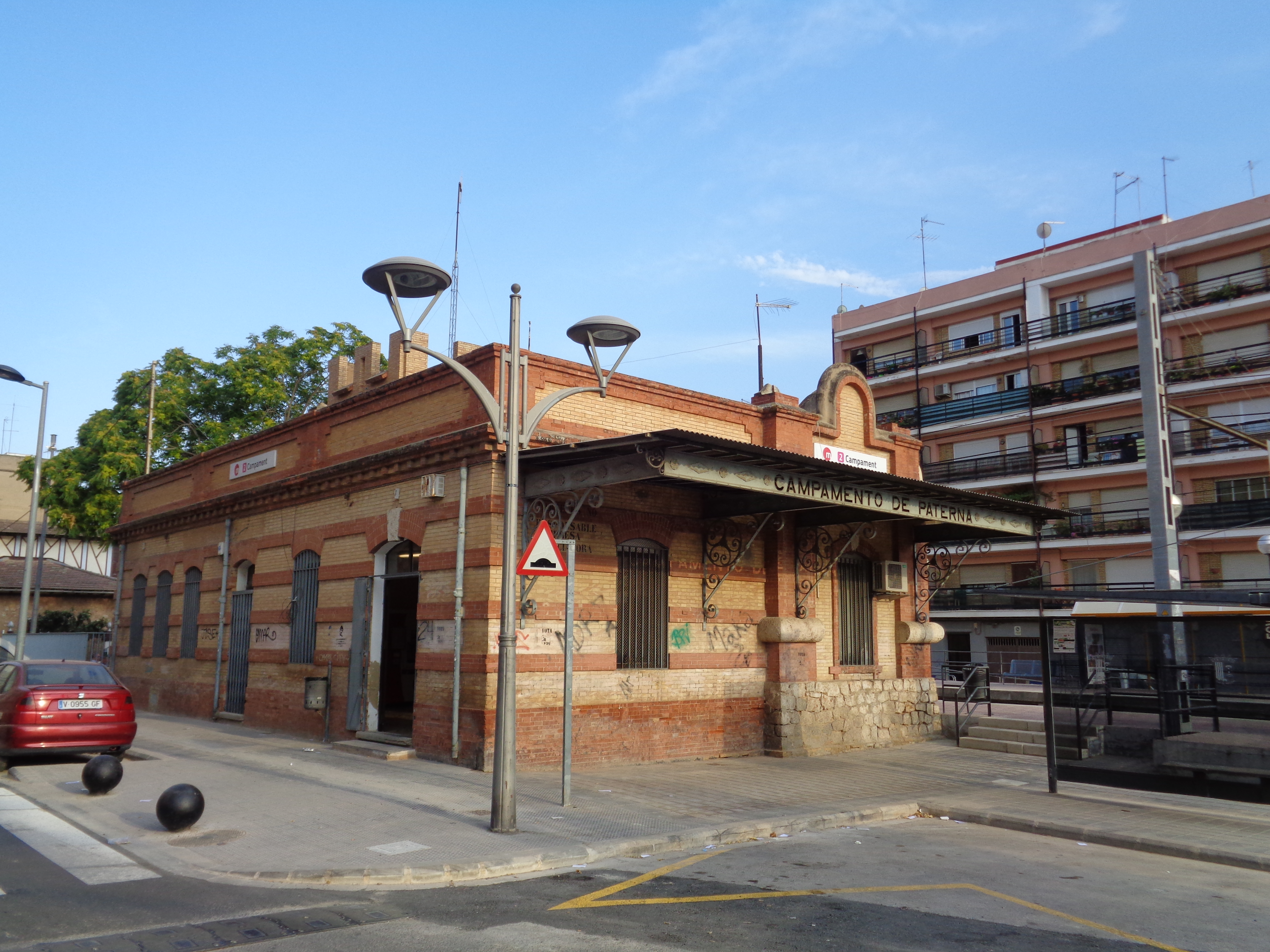 Estació de Campament, Paterna.